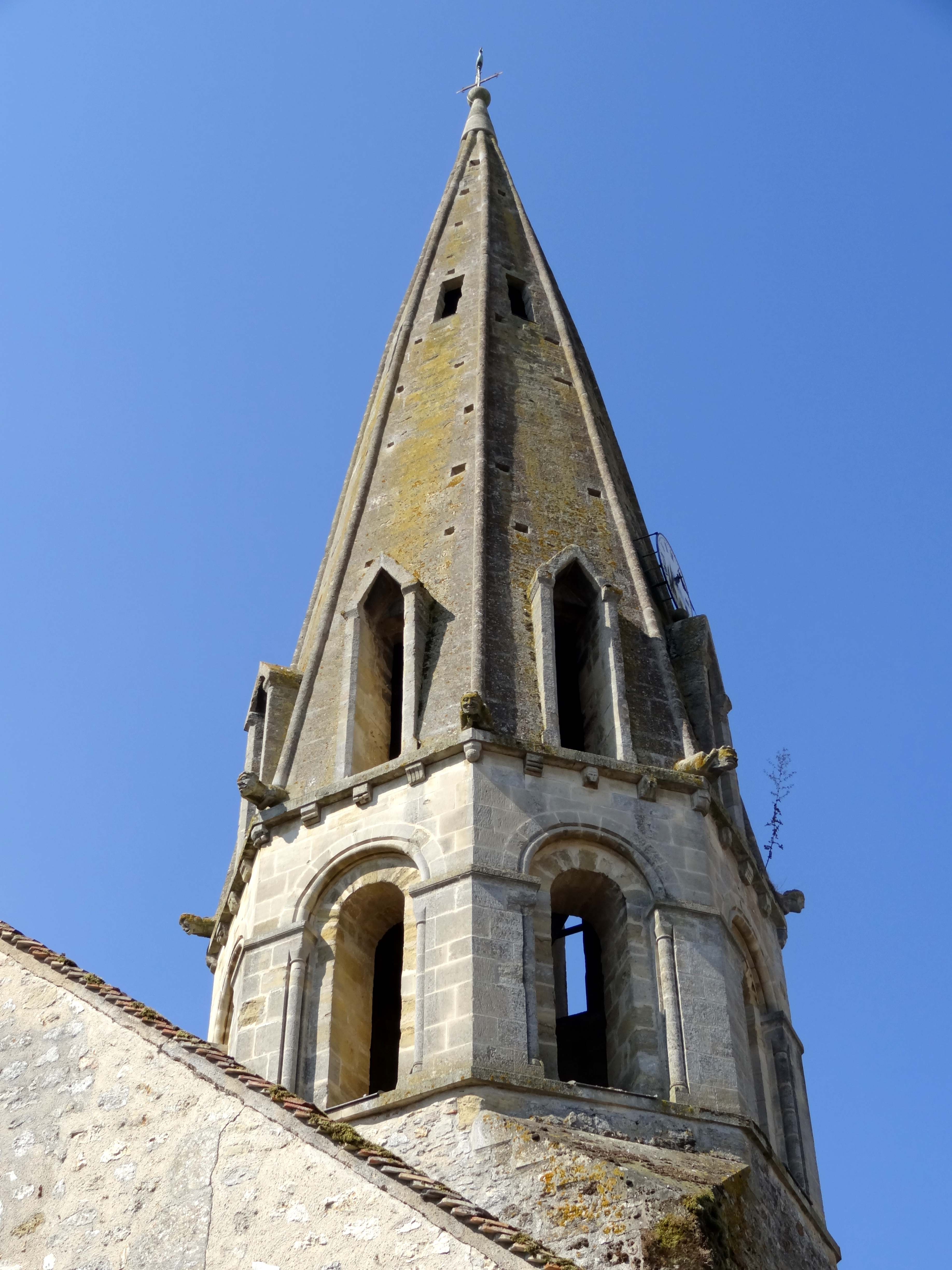 Église Notre-Dame de Jambville - voir titre.